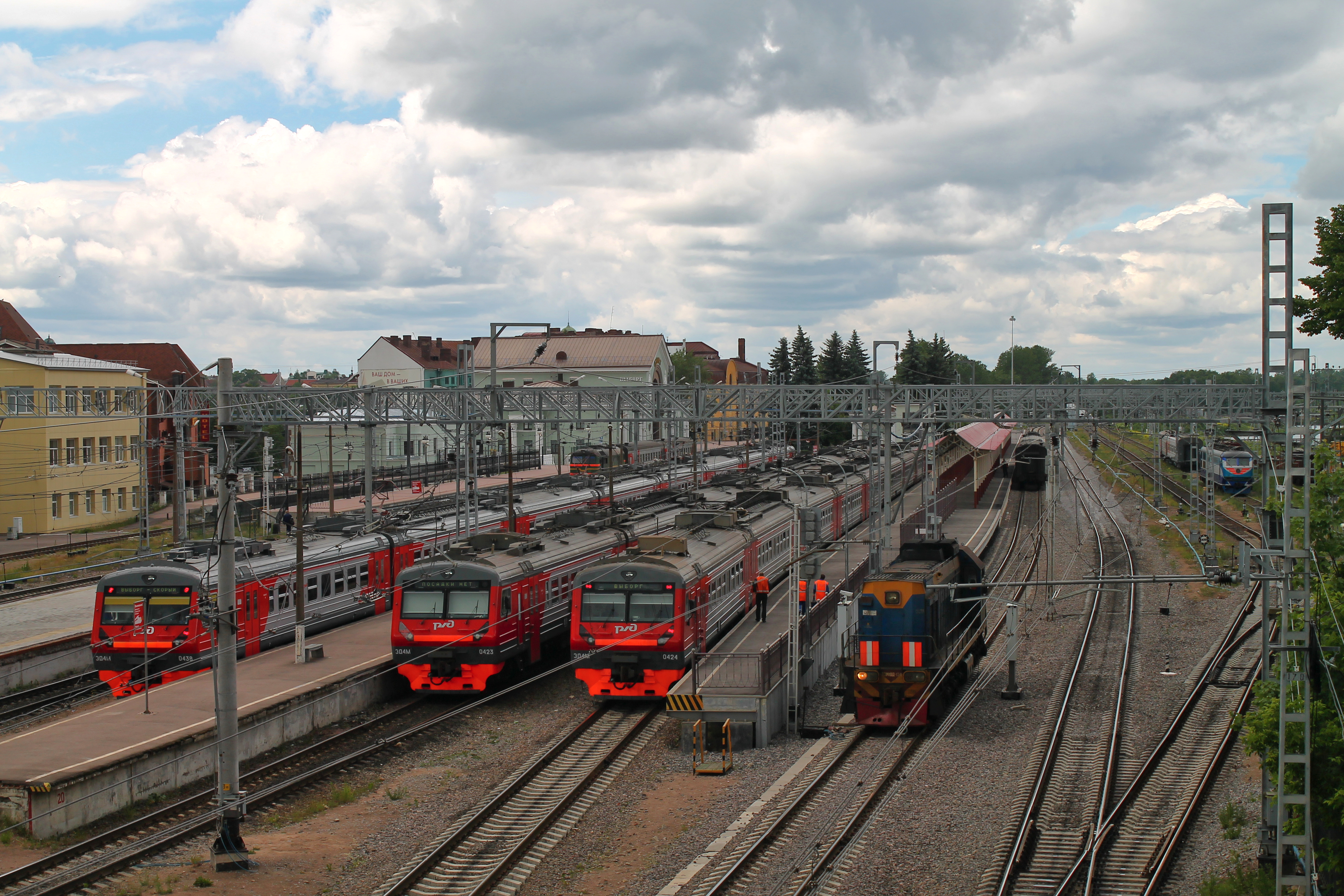 Железнодорожная станция Выборг. Электропоезда ЭД4М-438, ЭД4М-423, ЭД4М-424 и тепловоз ТЭМ18Д-134 см. фото 511296 в альбоме автора